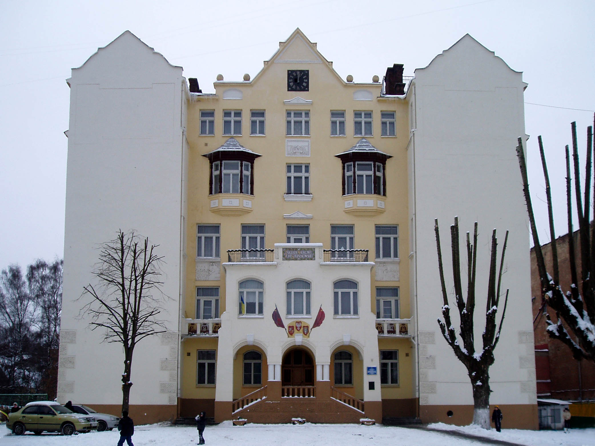 Школа № 6 у Львові. Збудована за проектом Альфреда Захаревича (1871—1937).